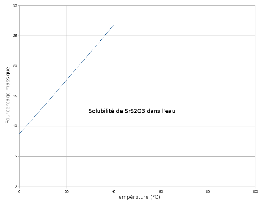 Solubilité de thiosulfate de strontium dans l'eau en fonction de la température.